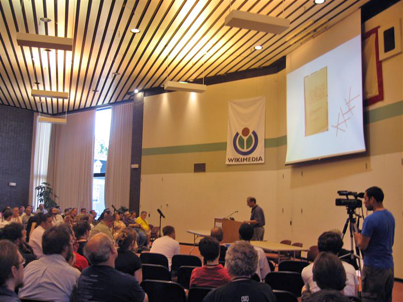 Talk at Wikimedia 2006.